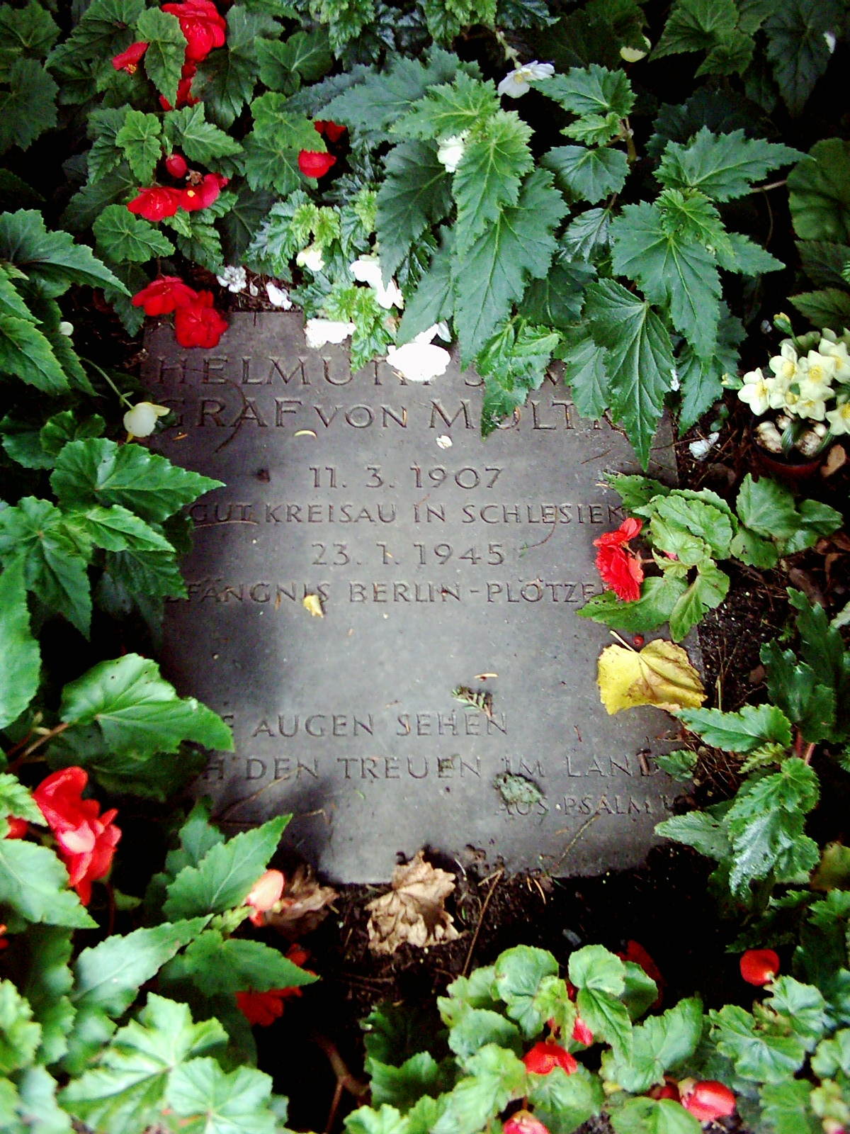 Gedenkplatte für Helmuth James von Moltke am Grab seines Vorfahren, des dänischen Generalleutnants Friedrich Philipp Victor von Moltke (1768-1845) auf dem Historischen Friedhof Wandsbek bei der Christuskirche (Hamburg-Wandsbek). This is a photograph of an architectural monument.